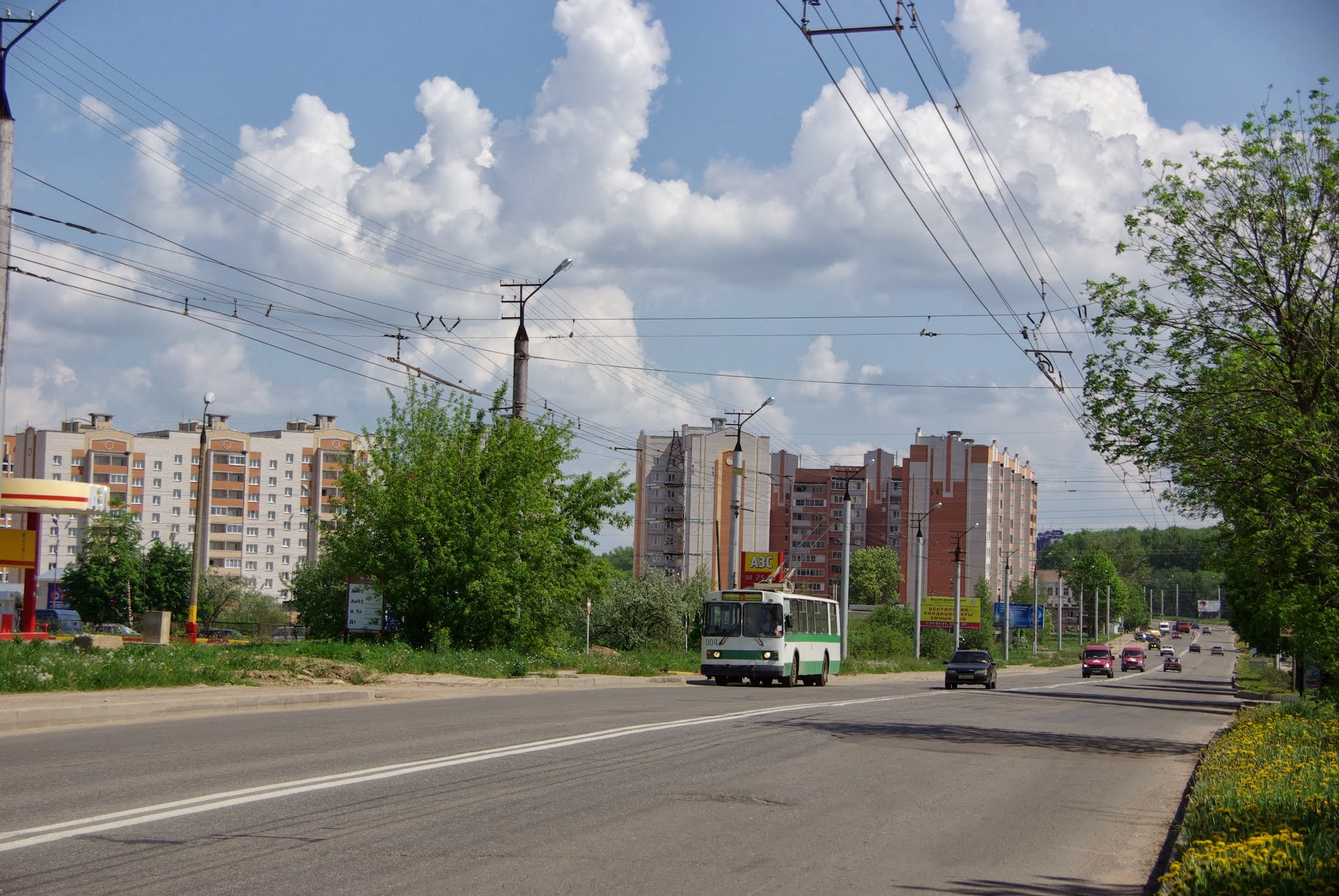 Leninskiy rayon, Smolensk, Smolenskaya oblast', Russia